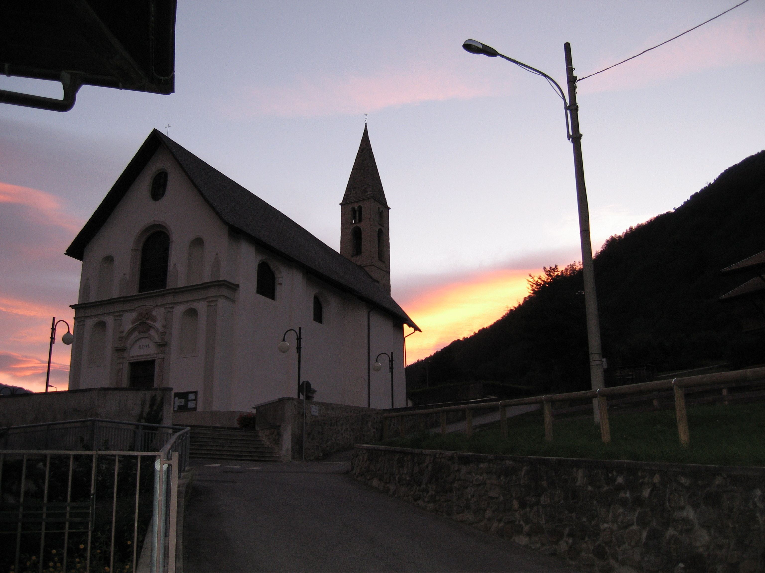 Chiesa di San Vigilio